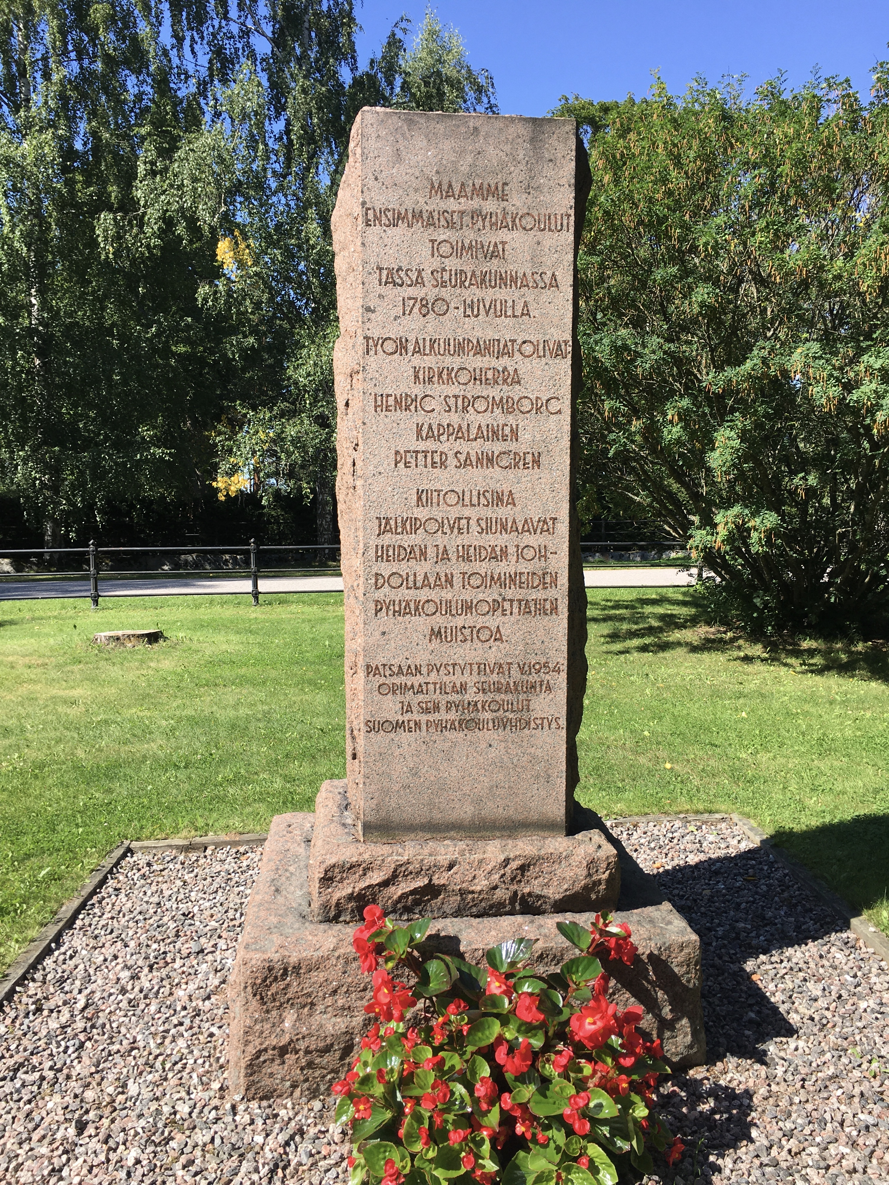 Pyhäkoulun muistomerkki Orimattilan kirkon pihassa